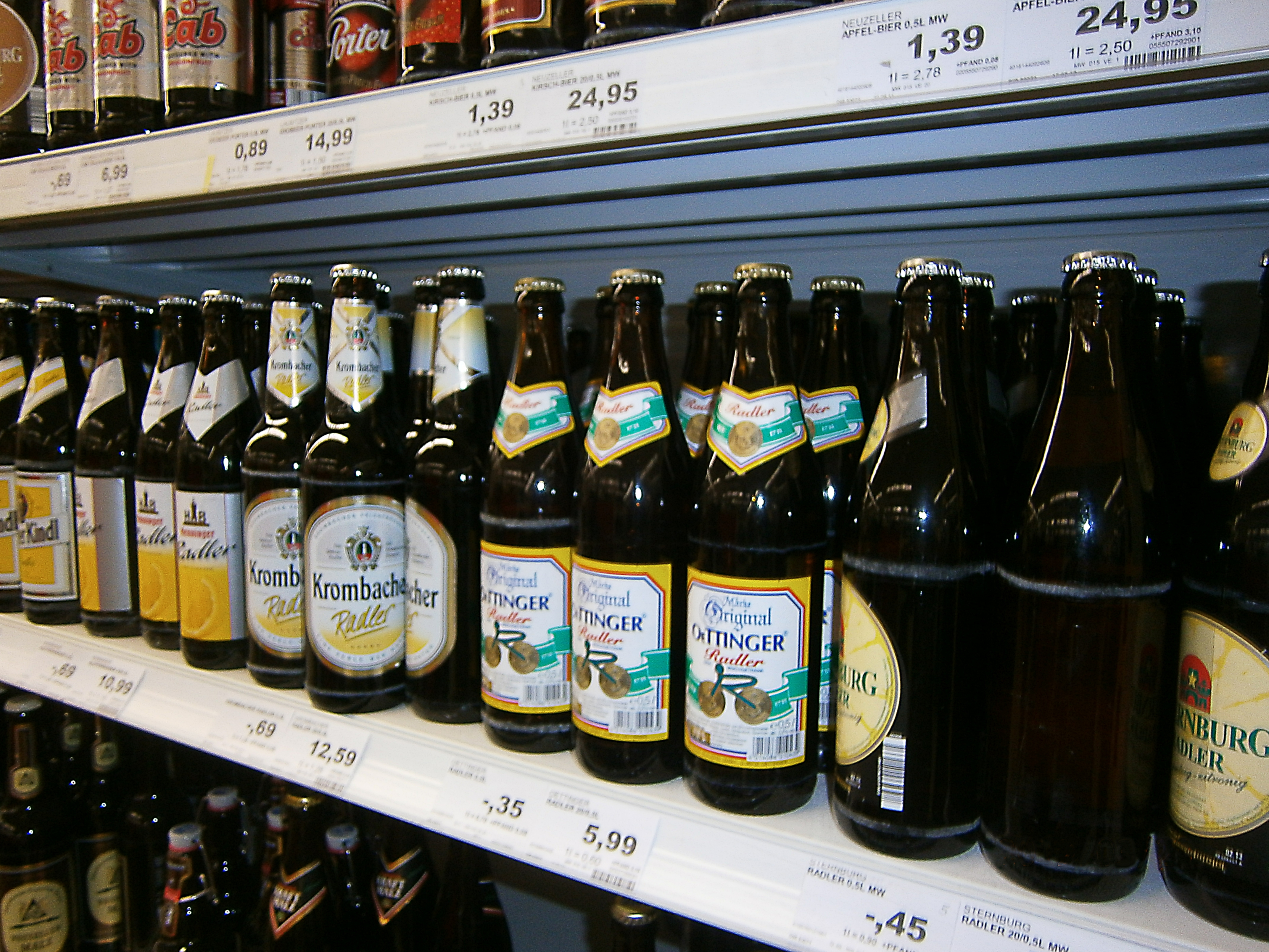 Biermischgetränke im Regal der Kaufhelle. Radler der Berliner Kindl-Brauerei. Henninger Radler. Krombacher Radler. Oettinger Radler. Sternburg Radler.